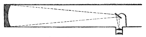 Coupe du télescope Foucault pour La Nature, revue des sciences, n° 24, page 371.